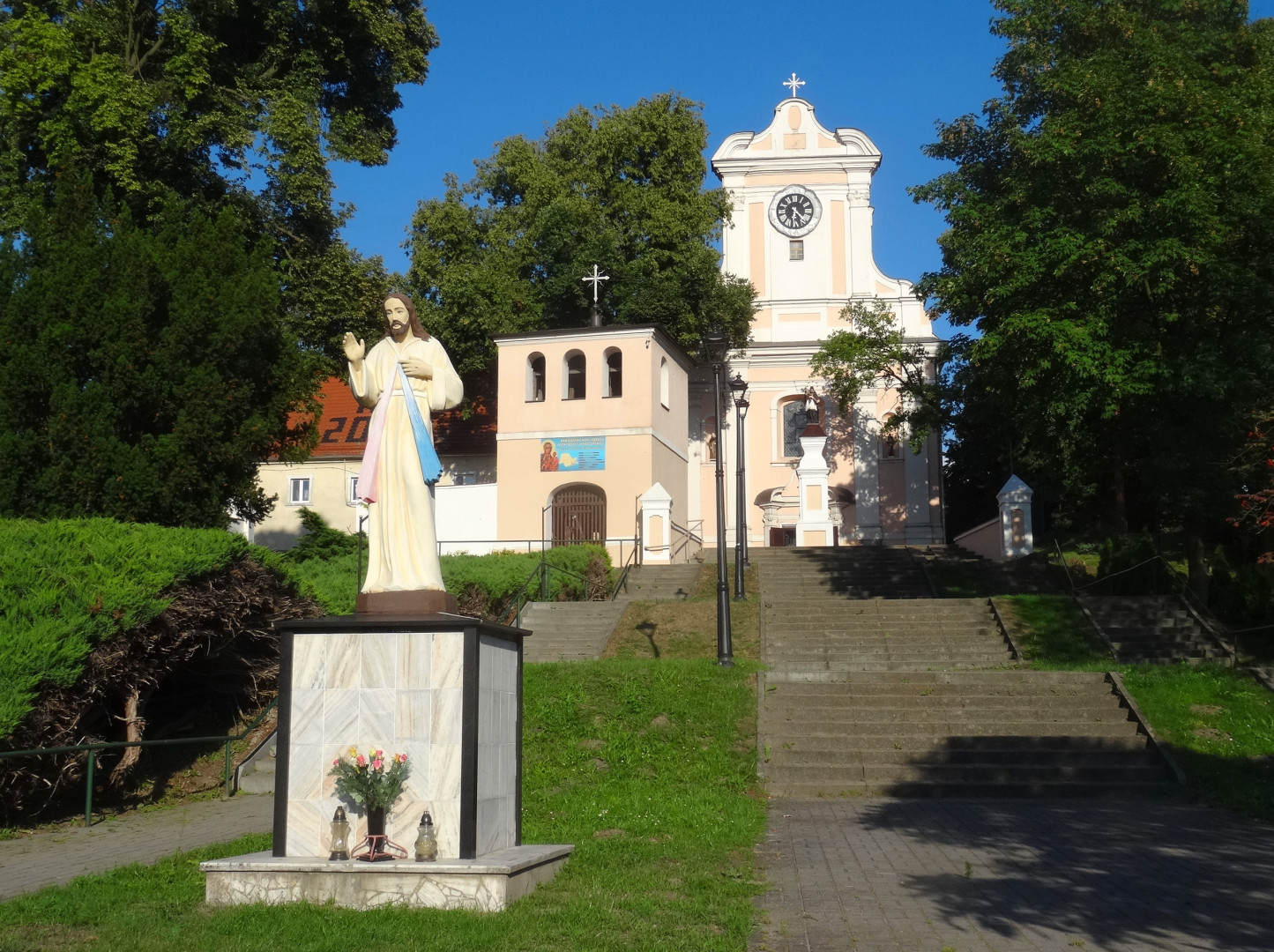 Łabiszyn - dawny kościół klasztorny reformatów, ob. parafialny pw. św. Mikołaja, 2 poł. XVIII w.